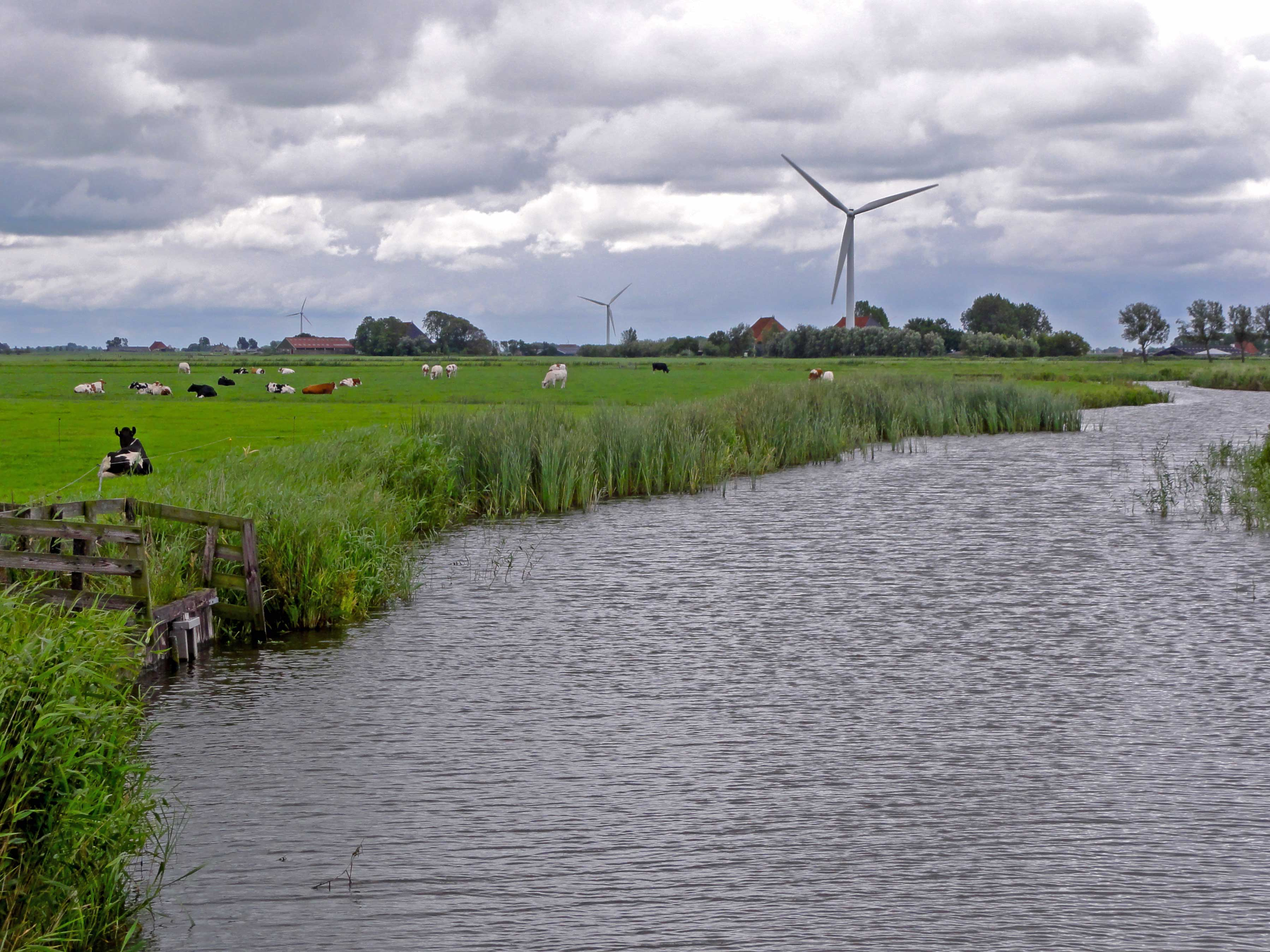 Melkvaart tussen Wons en Makkum